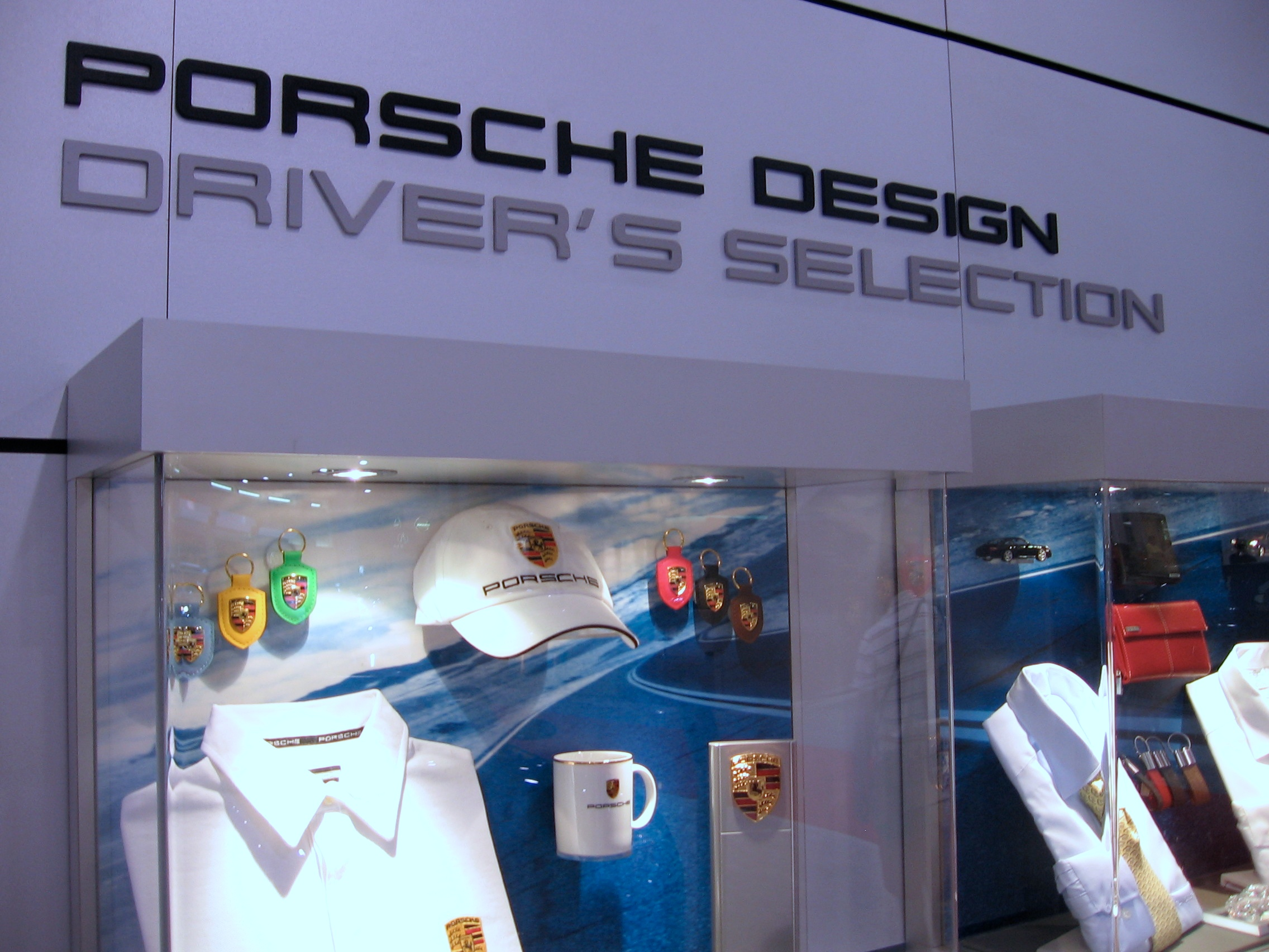 PORSCHE DRIVER'S SELECTION